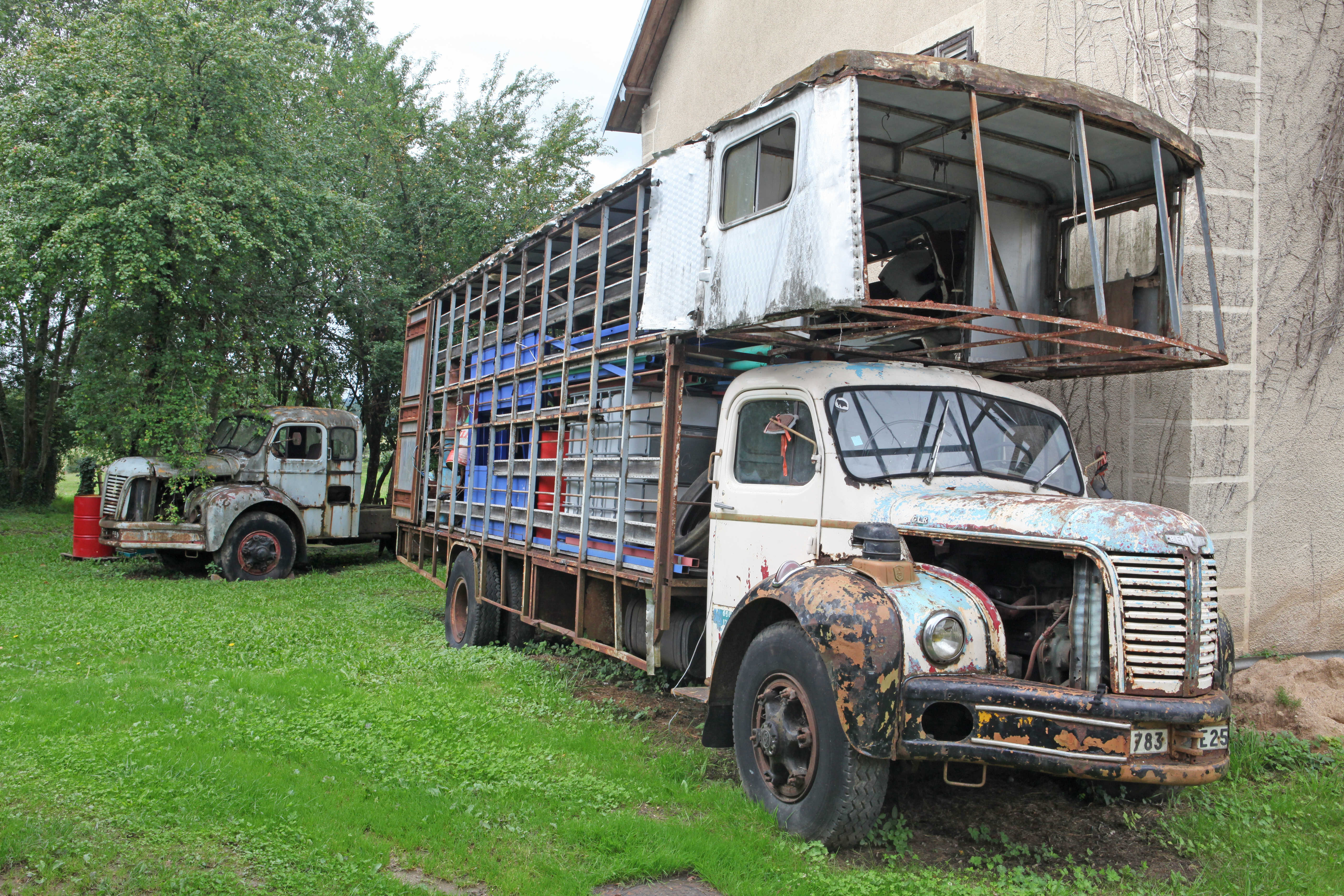 Berliet CLR 8 R